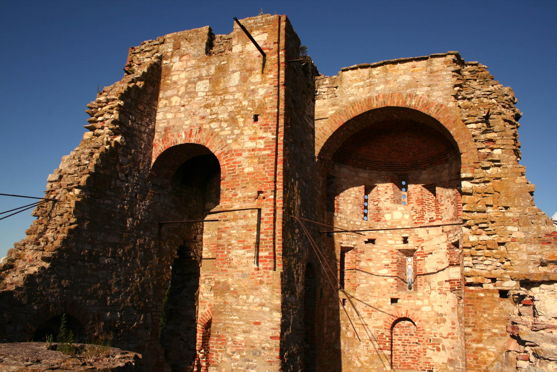 Церковь Благовещения на Рюриковом Городище (руины) (Новгородская область, Великий Новгород, 2 км южнее города, правый берег р. Волхов)